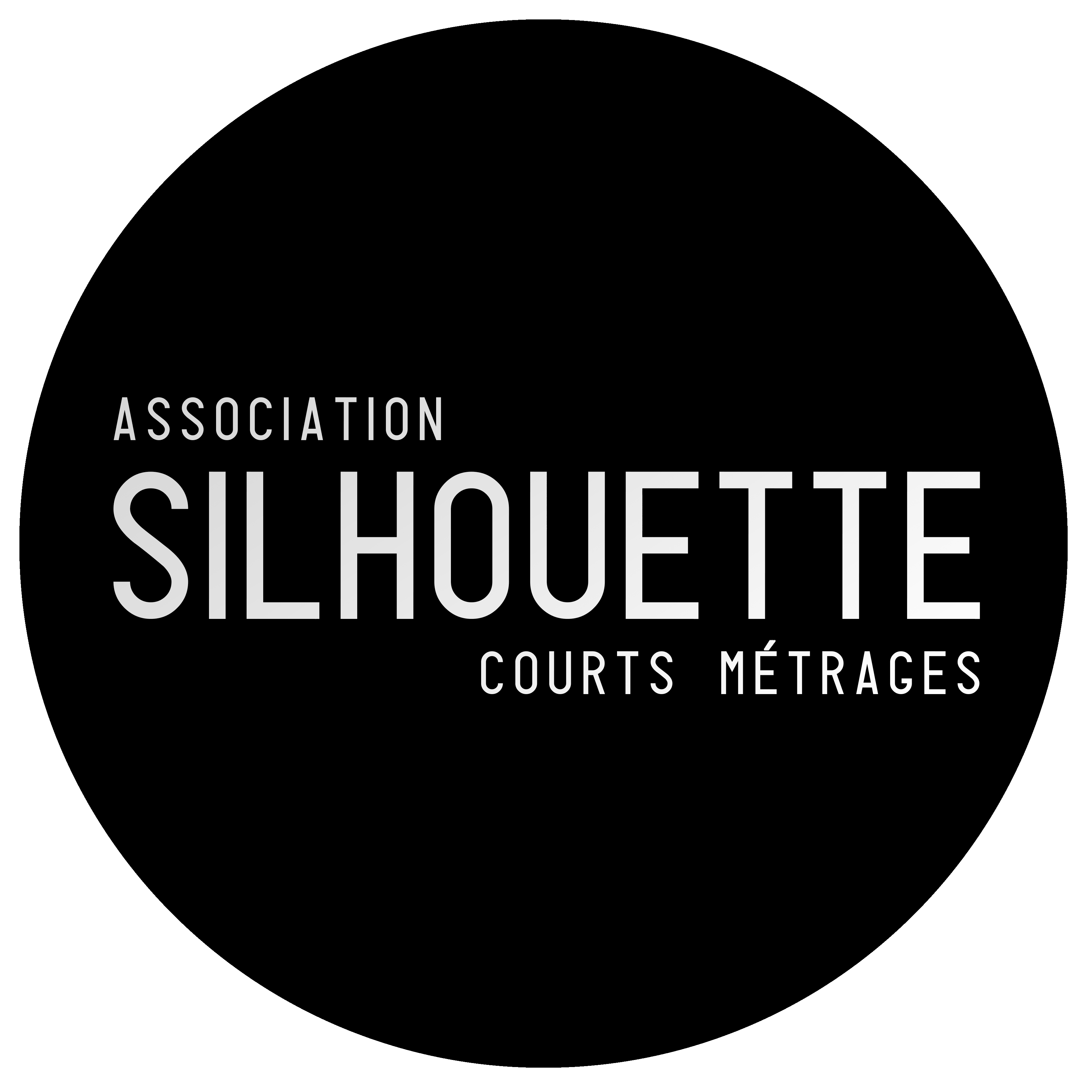 Logo de l'Association Silhouette